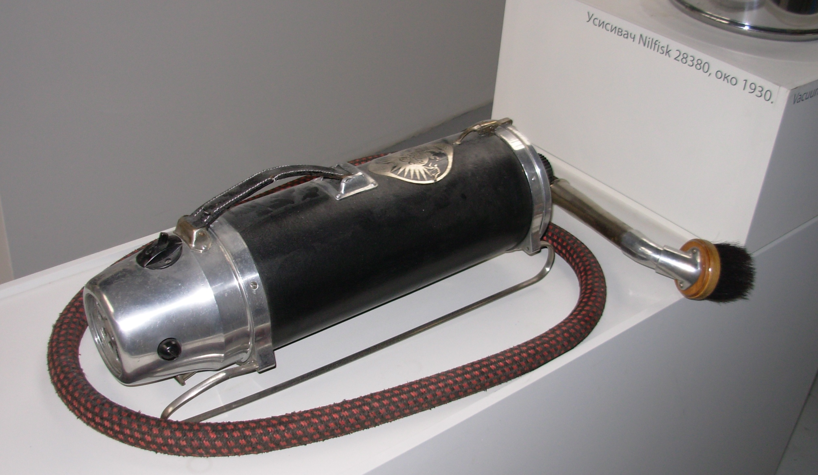 Usisivač, Muzej nauke i tehnike Beograd. Slikao Goldfinger